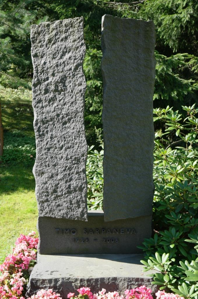 Grab des finnischen Designers Timo Sarpaneva (1926-2006) auf dem Friedhof Hietaniemi in Helsinki